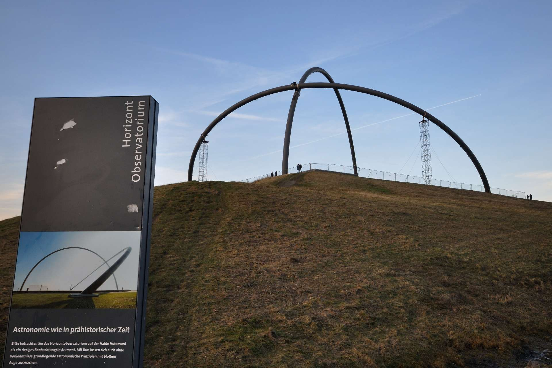 Hoheward Horizont Observatorium